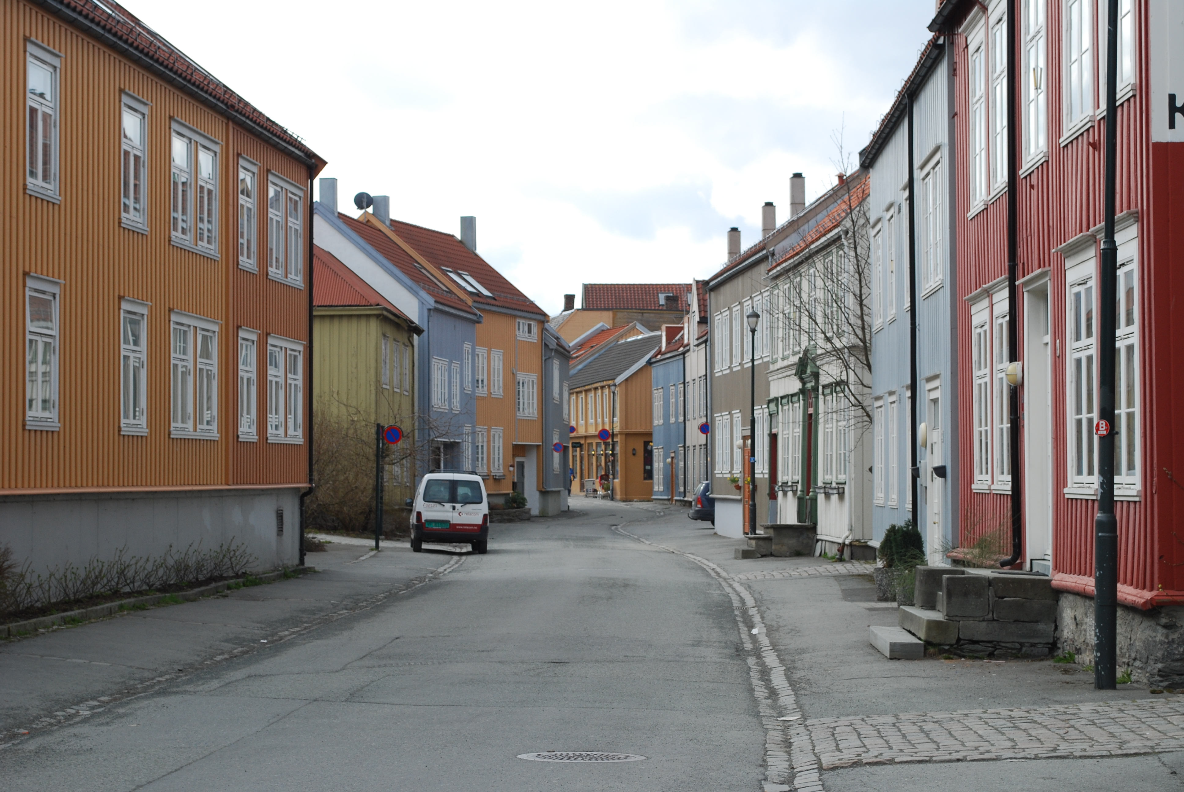 Nedre Bakklandet ved Nygata i Trondheim, sett fra nord mot sørlig retning.